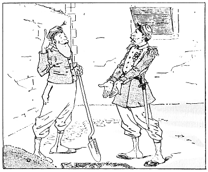 Case de l'histoire en image du sapeur Camember